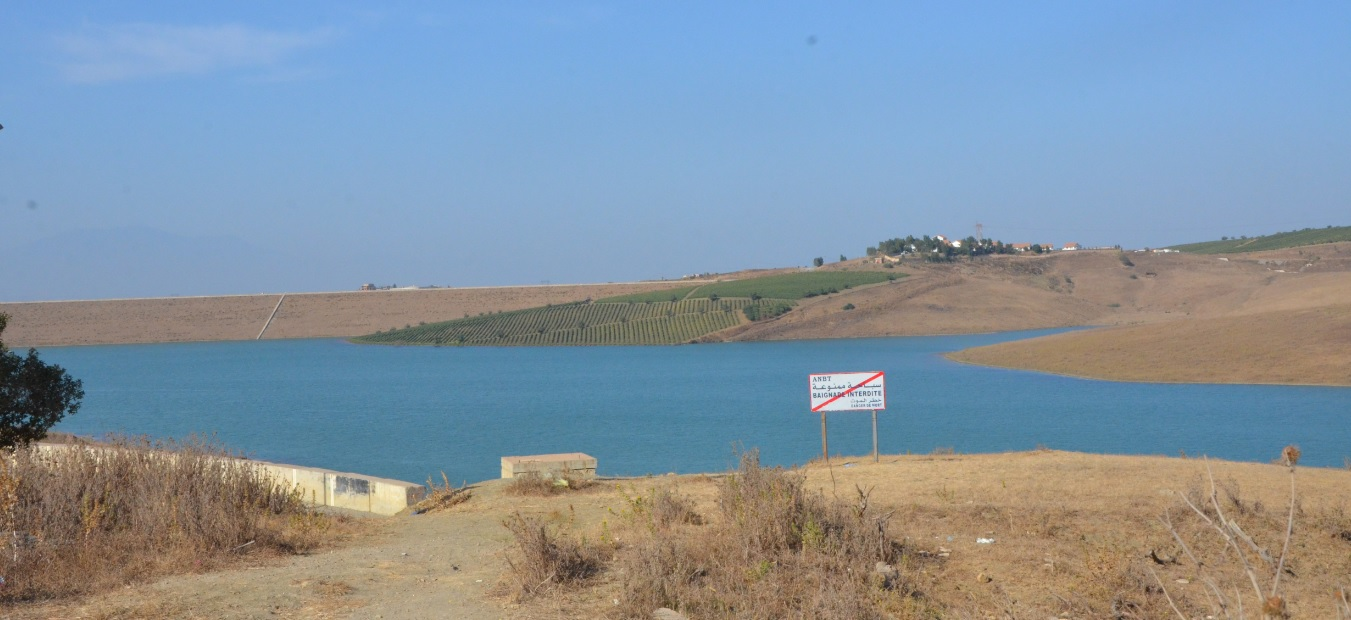 Barrage de Douera